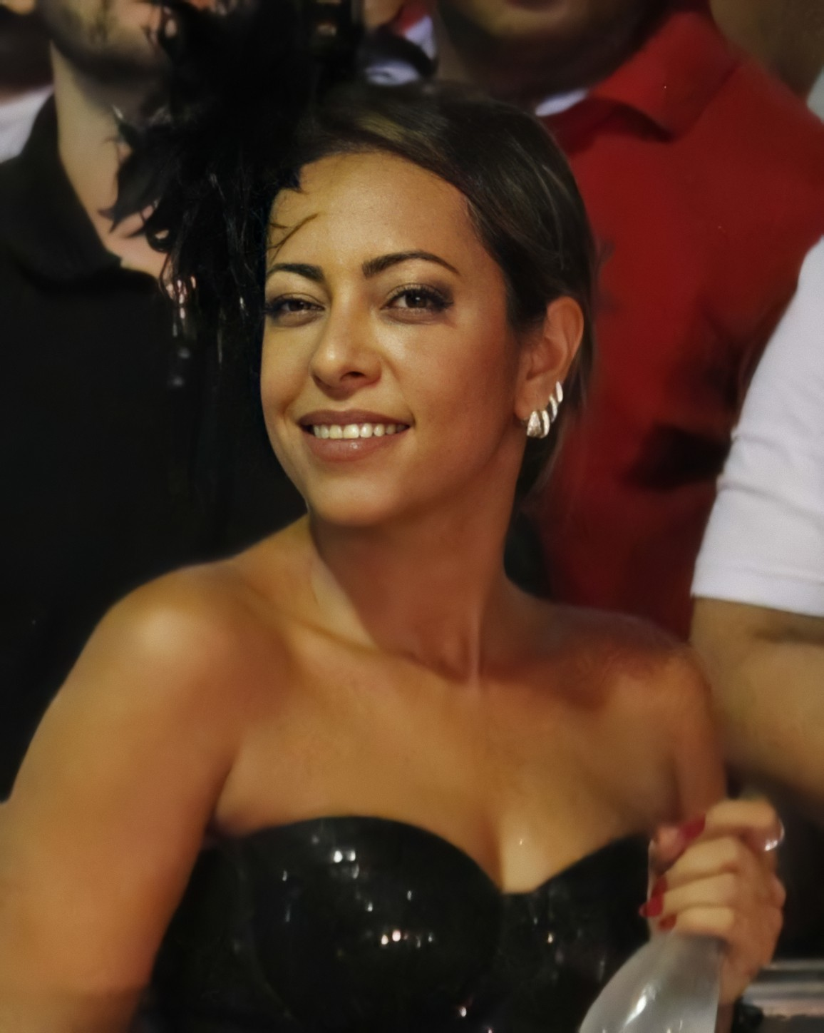 As atrizes Paola Oliveira e Samantha Schmütz, e o ator Joaquim Lopes.